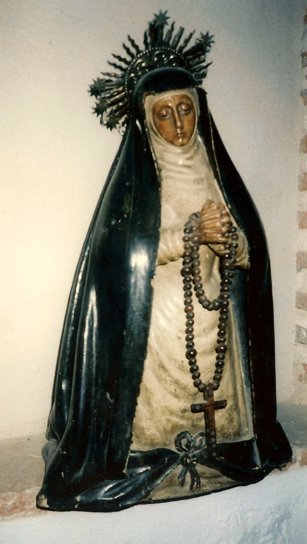 Imagen de una Dolorosa en la iglesia de San Andrés de Cuéllar